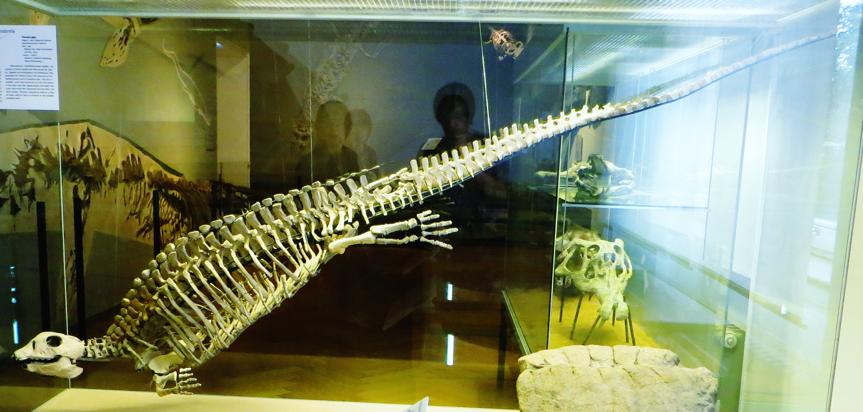 Fossil of Placodus, an extinct reptile - Took the picture at Museum of Paleontology, Tuebingen